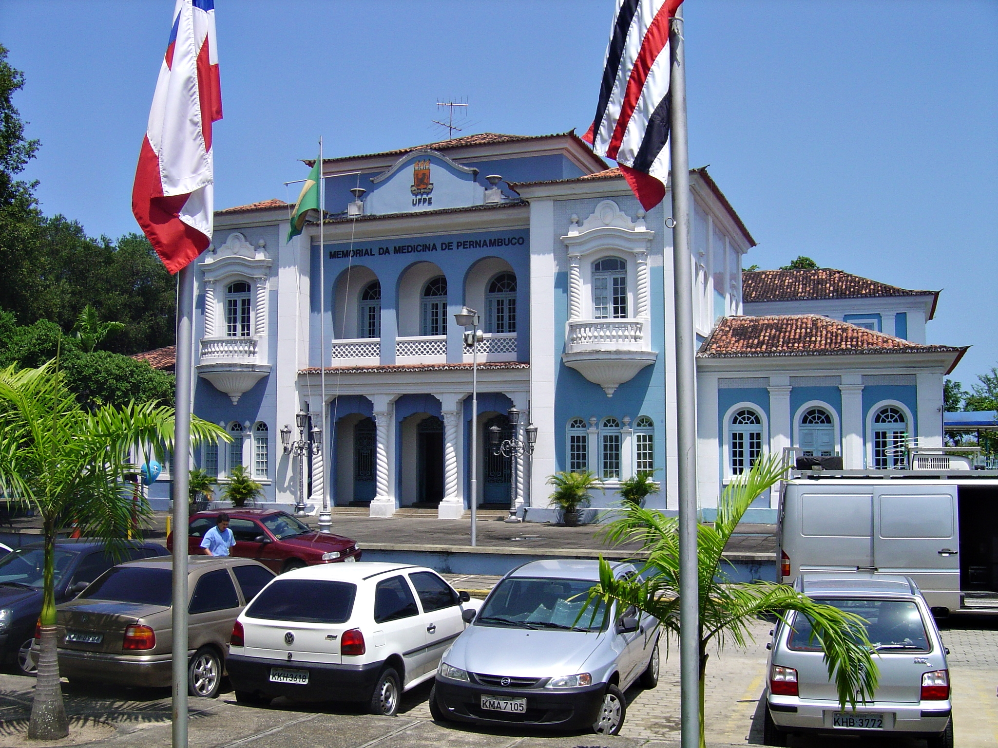 Memorial da Medicina de Pernambuco.